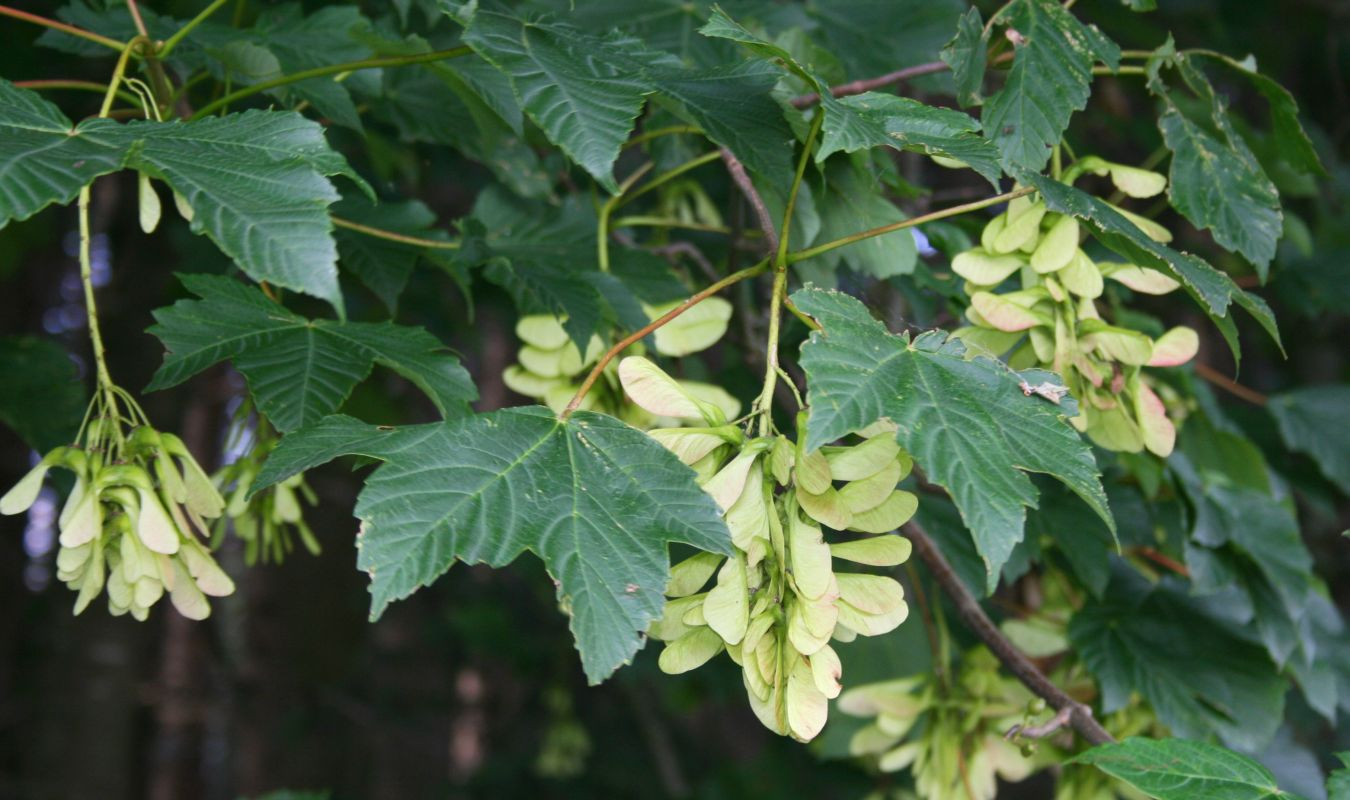 Berg-Ahorn (Acer pseudoplatanus), Seifenbaumgewächse (Sapindaceae) - Österreich/Austria/Autriche: Oberösterreich, Hausruckviertel, Kien NW Attnang-Puchheim